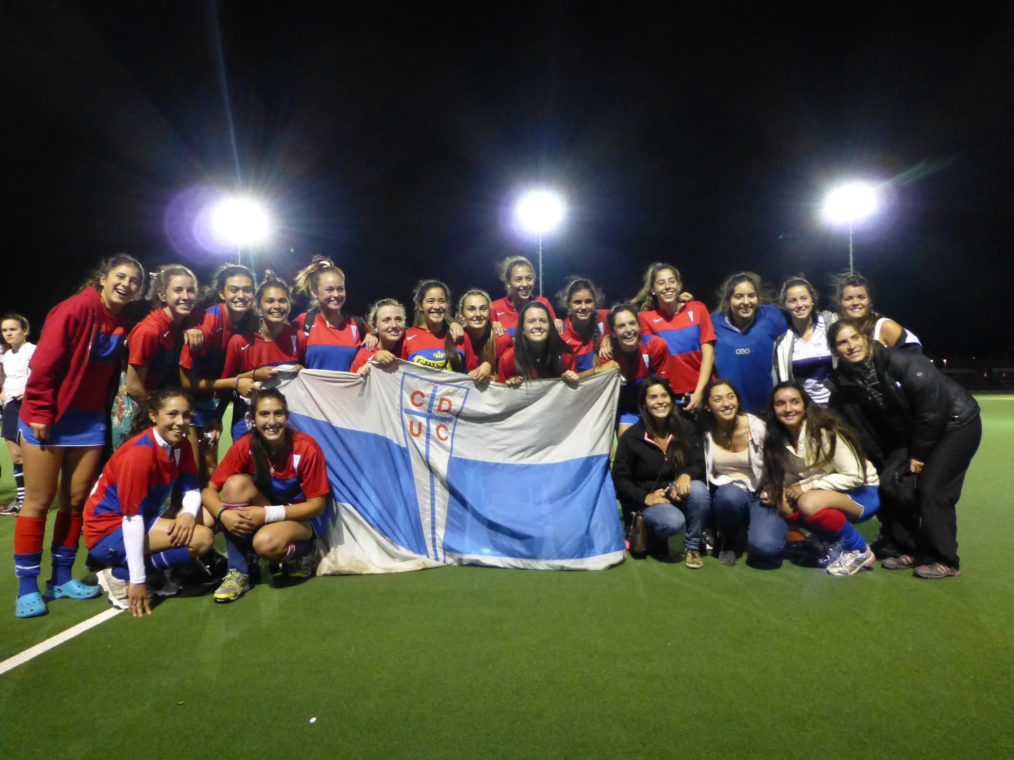 La Sub 19 en la obtención de su Bicampeonato (2011-2012)